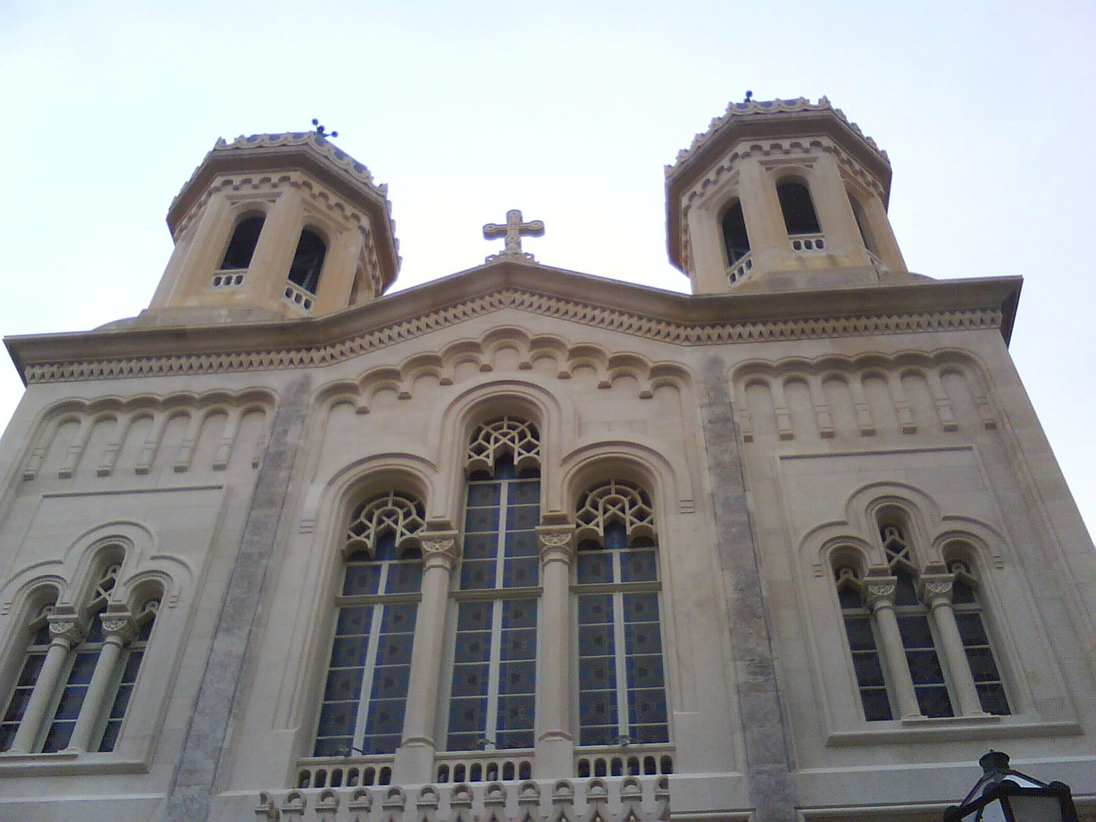 Pravoslavna crkva u Starom gradu , Dubrovnik